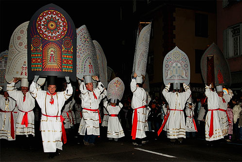 Klausjagen in Küssnacht: Iffelen